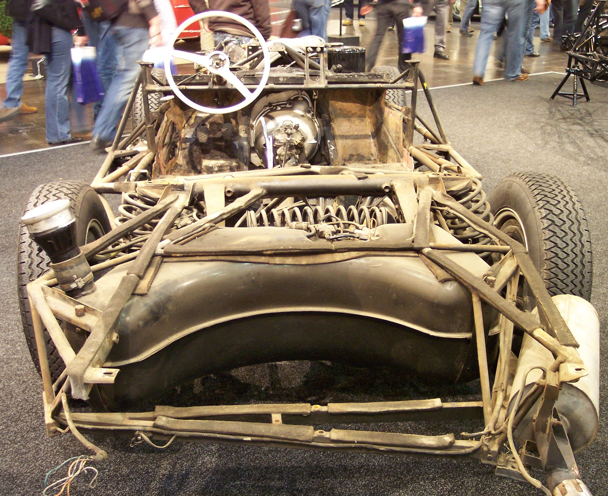 Mercedes-Benz SL 300 Chassis